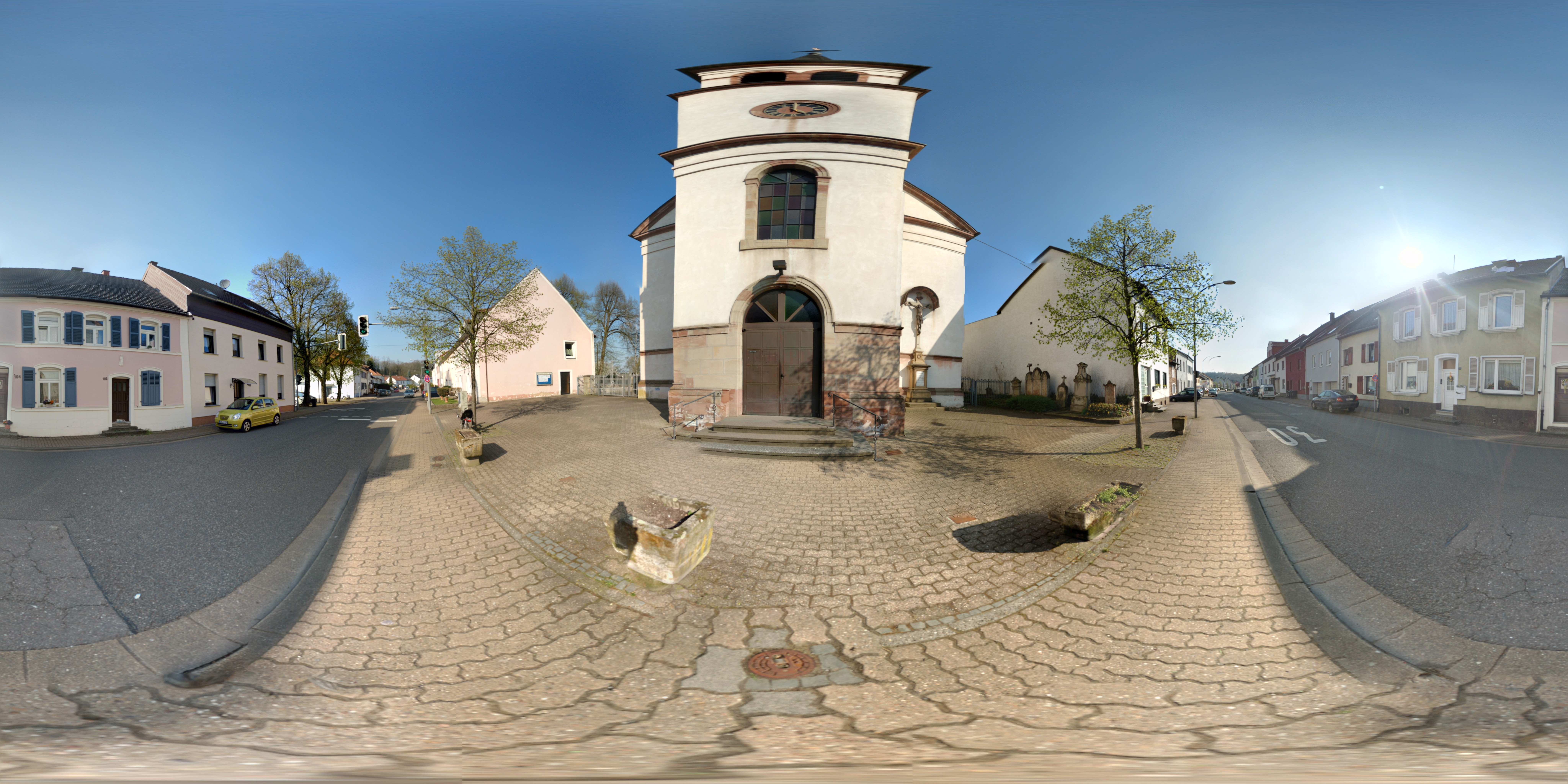 Kirche Beaumarais pano